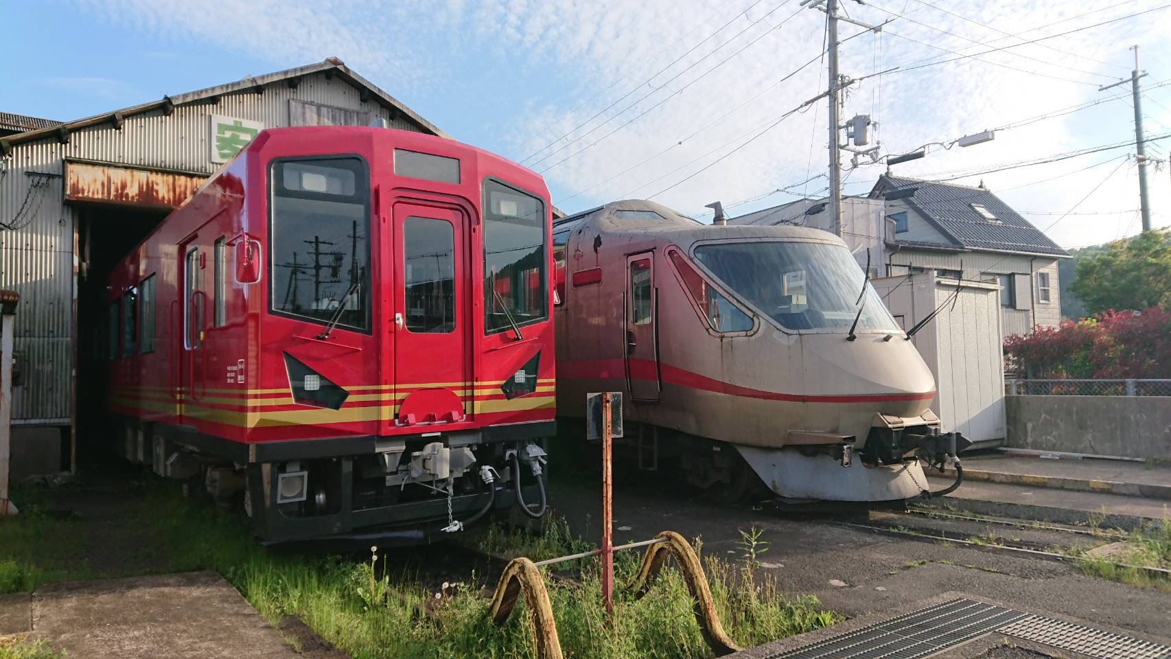 2019年（令和元年）5月18日（土）より運行を開始する、京都丹後鉄道の新車両 300形。